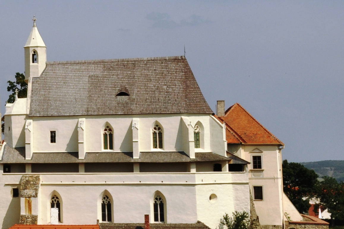 Kaple sv. Václava (Znojmo), Mikulášské nám. 63, Znojmo